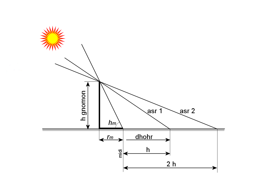 Longueurs d'ombre pour la prière de l'asr.